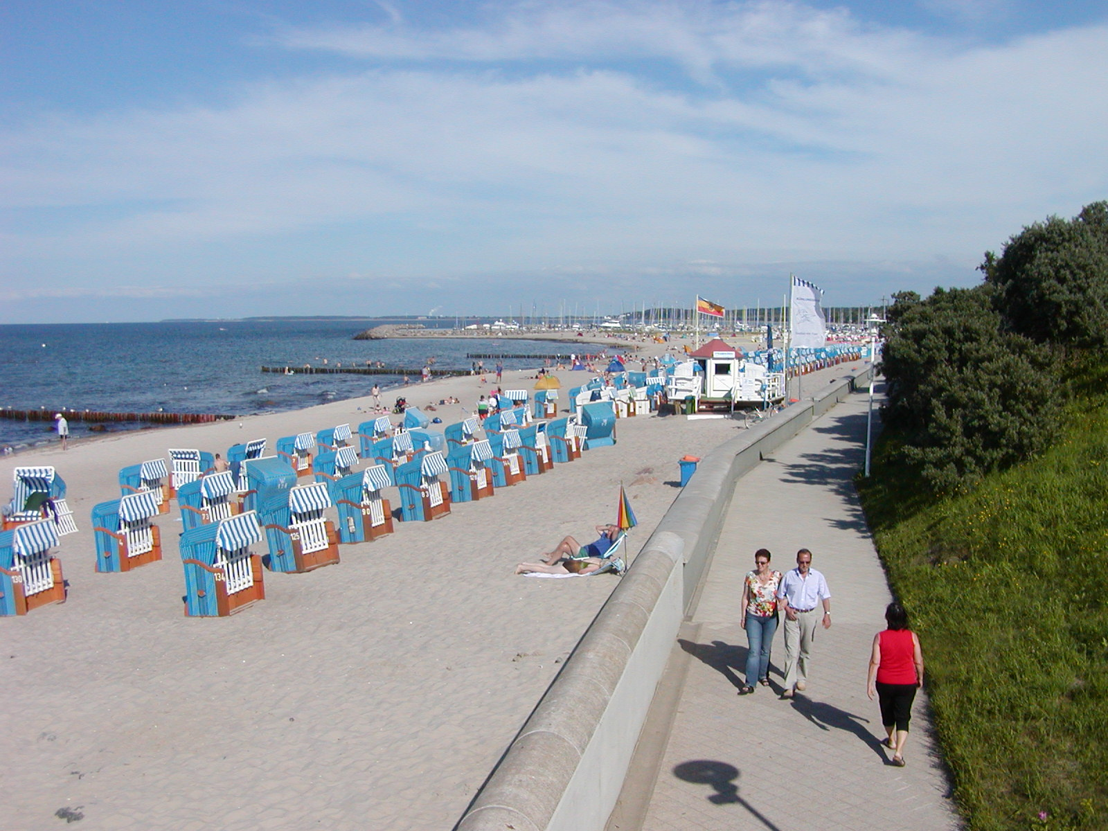 Strand und Promenade in Kühlungsborn